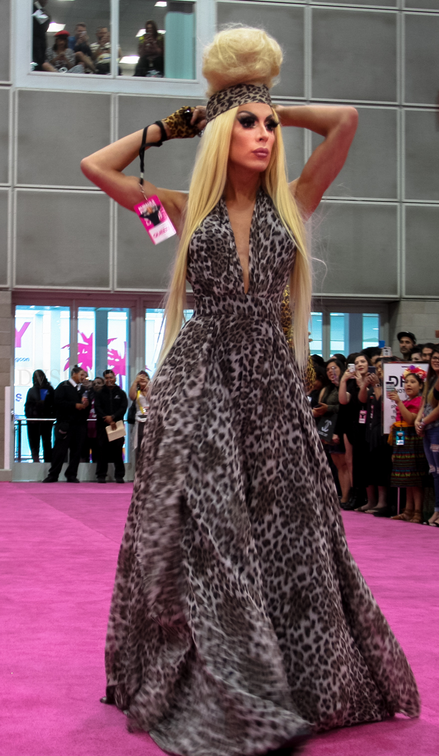 Rupaul DragCon 2019 - Los Angeles